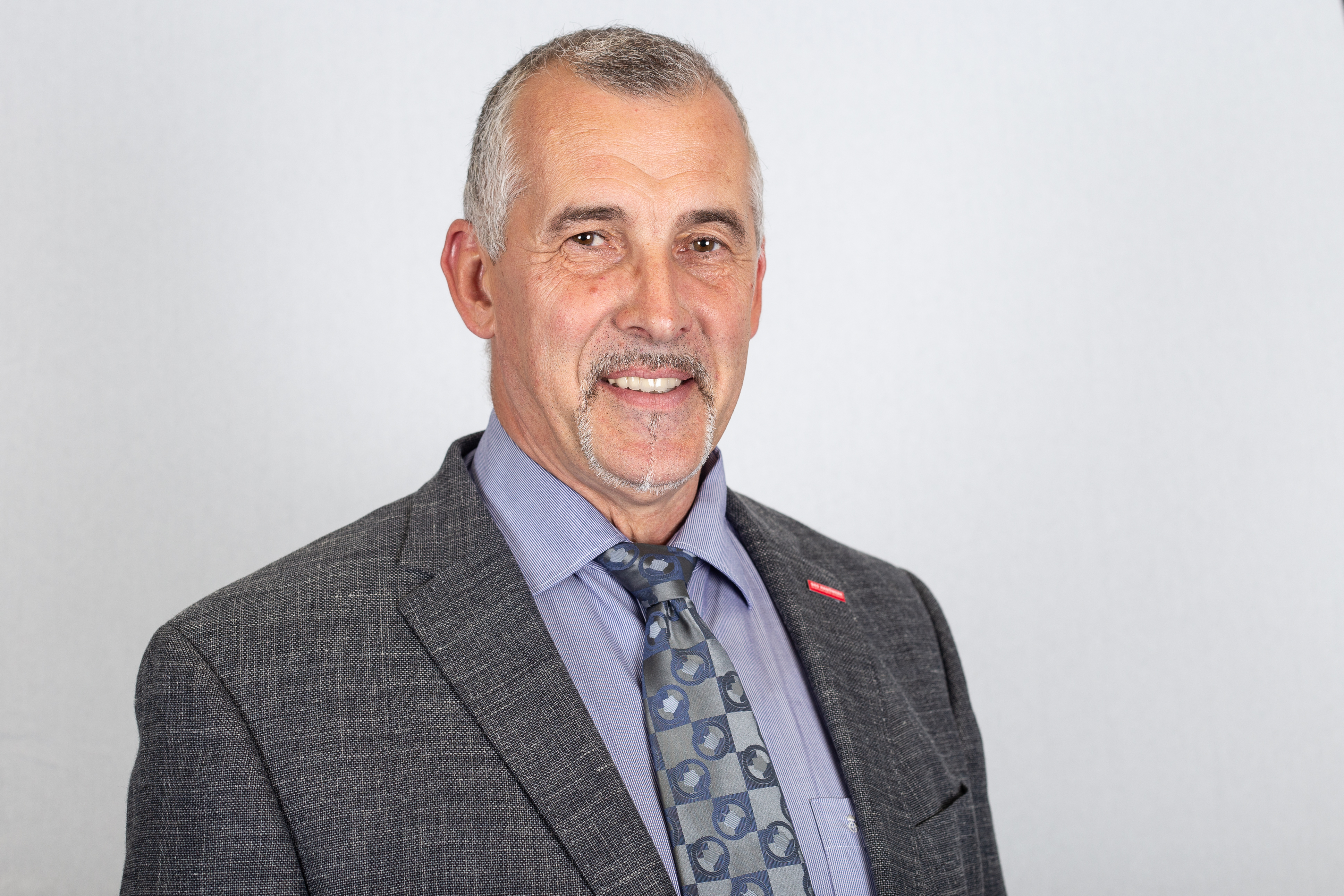 Thomas Keindorf, MdL Sachsen-Anhalt, CDU